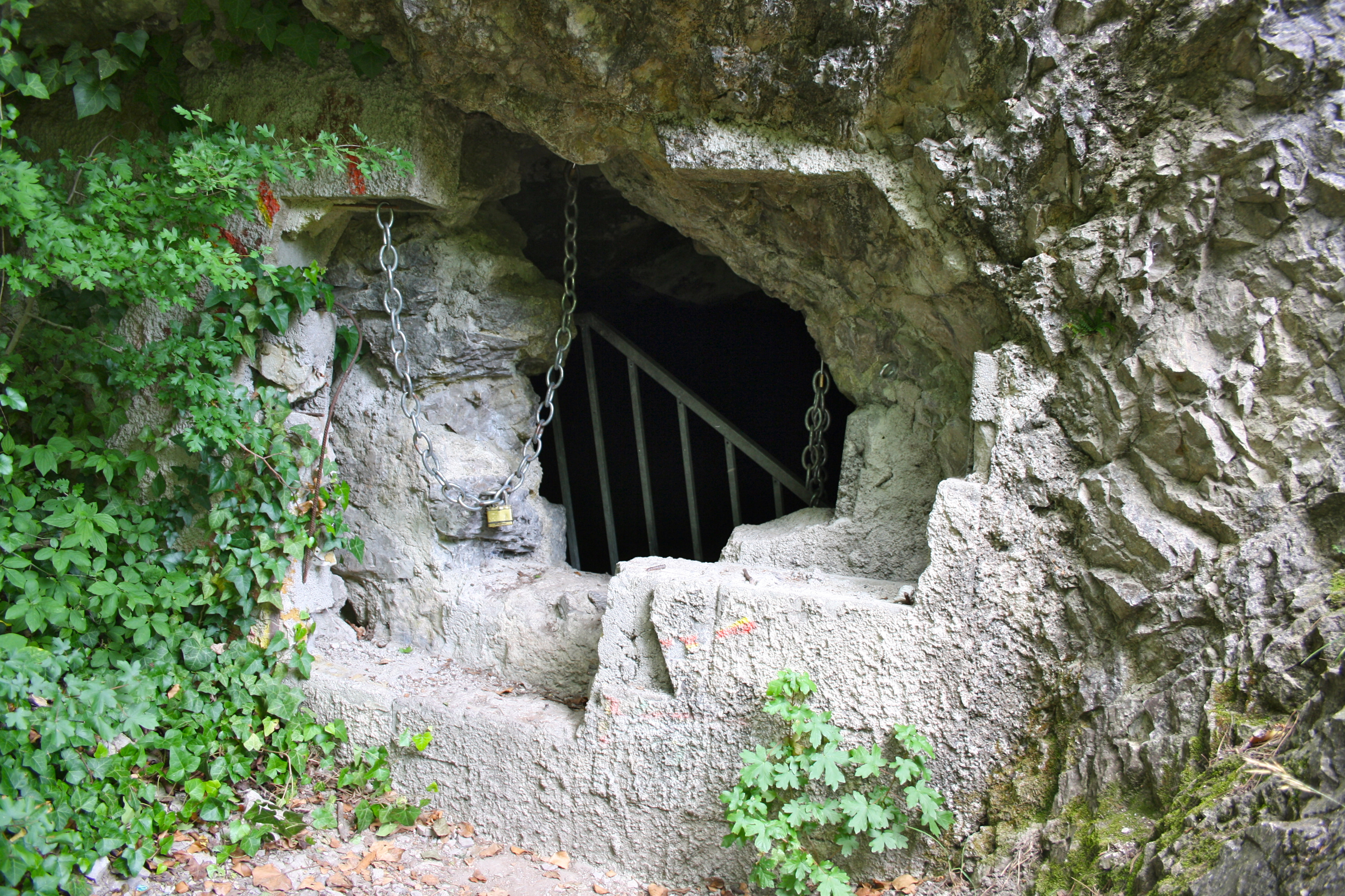 Höhle in der Mizzi-Langer-Wand in Wien-Rodaun.